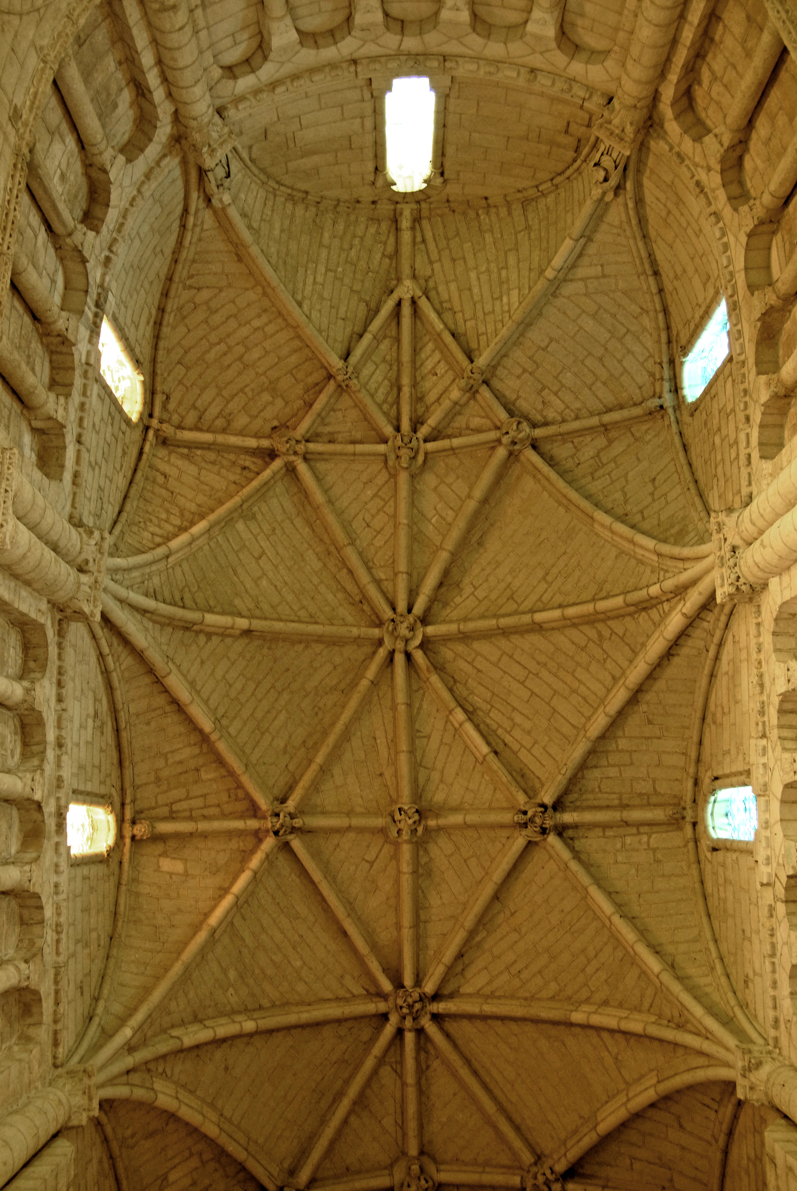 Saint-Jouin-de-Marnes, Kreuzrippengewölbe Chor